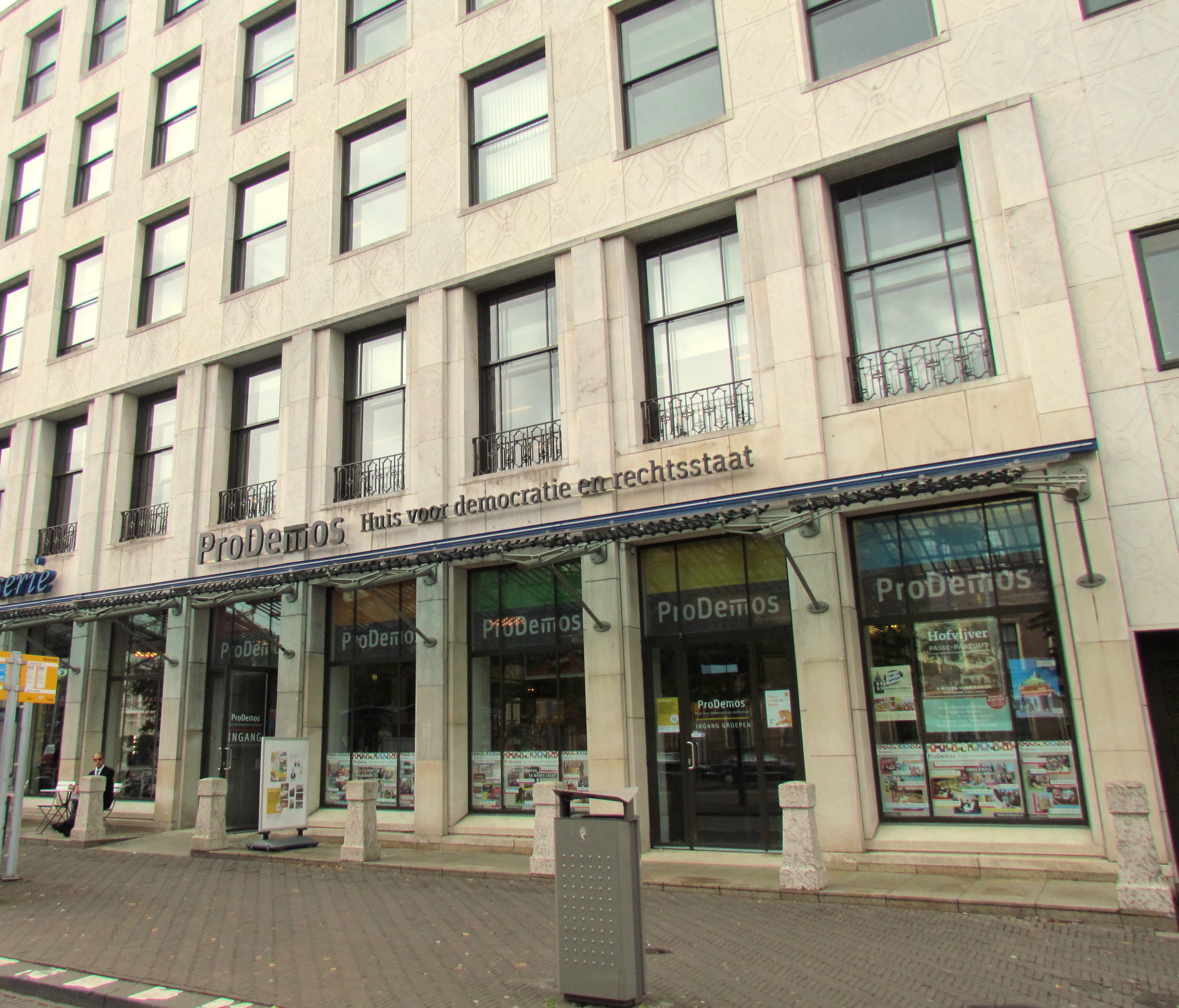 ProDemos, Huis voor democratie en rechtsstaat, aan de Hofweg 1H in Den Haag